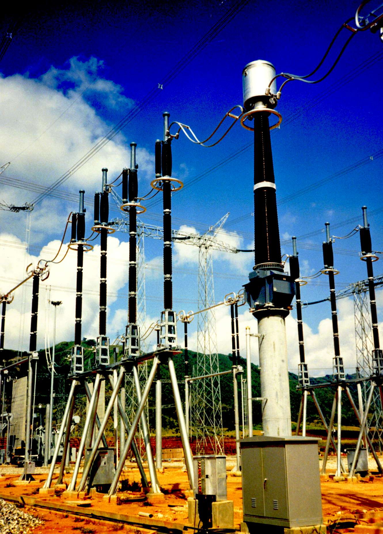 Image faite par le contributeur, déjà dans l'article correspondant de WP EN, accordée avec licence Creative Commons BY-SA